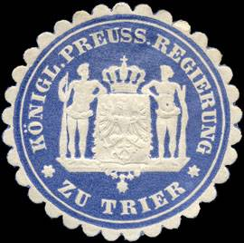 Sealing stamp Title: Königlich Preussische Regierung zu Trier Description: blau, weiß, geprägt Place: Trier size: 3 cm